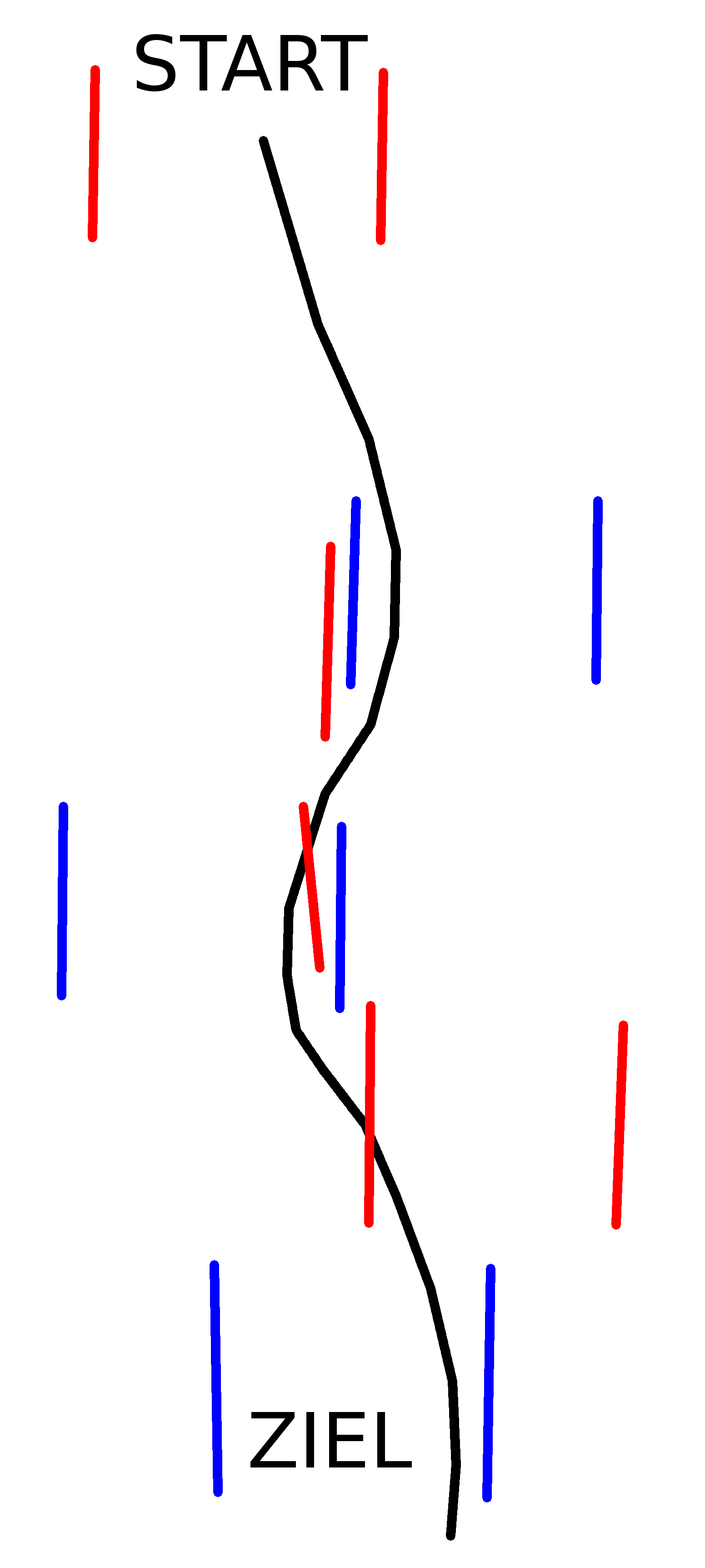 Slalomstangen. Die Fahrer müssen jeweils abwechslungsweise durch rote und blaue Tore fahren. Eines der roten Tore ist vertikal (quer zur Hangrichtung). Dies entspricht der Situation bei der Abfahrt, dem Super-G und dem Riesenslalom, wo die Slalomstangen jeweils doppelt ausgeführt sind.